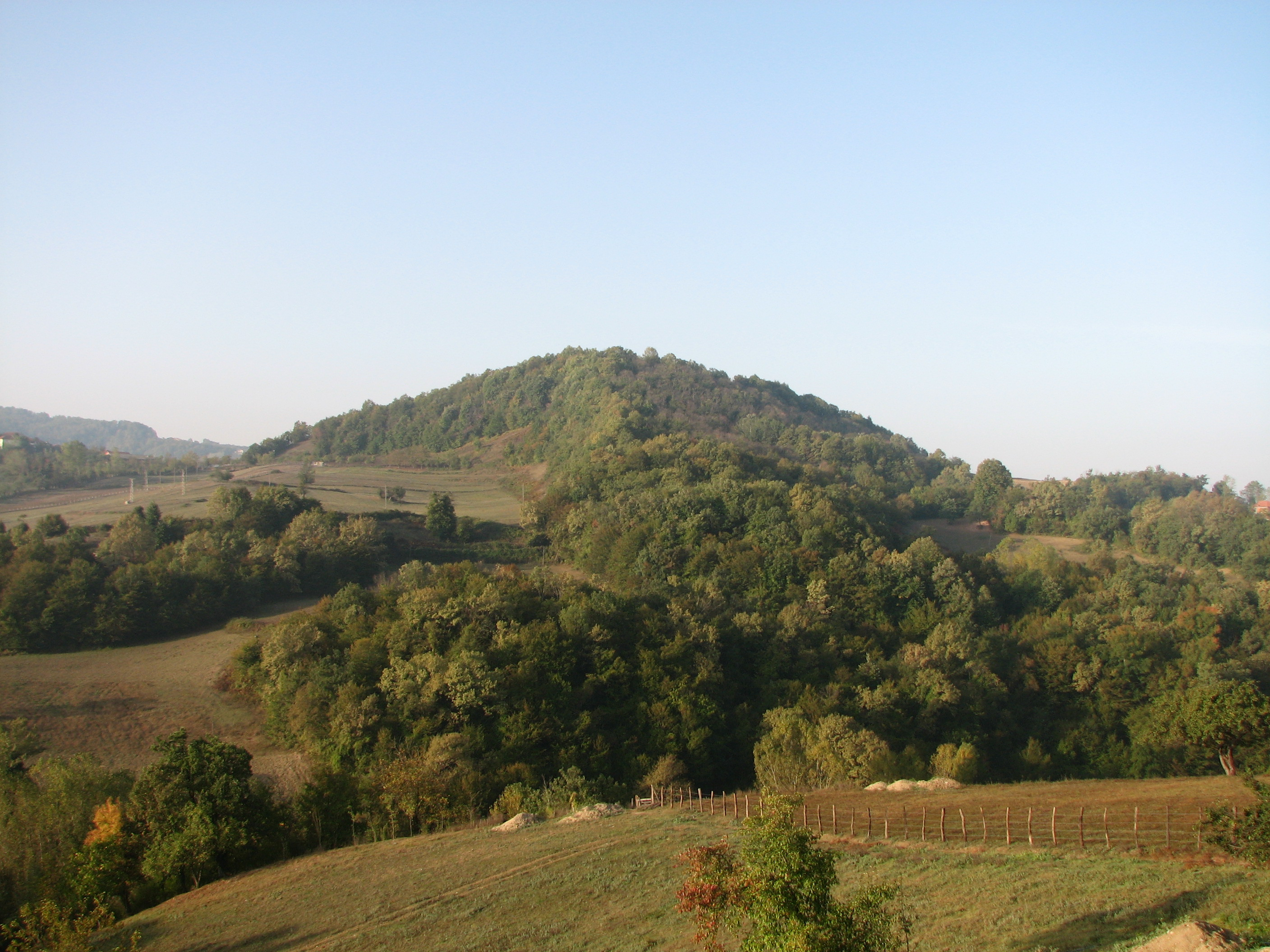 Emirsah Koyu daga dogru